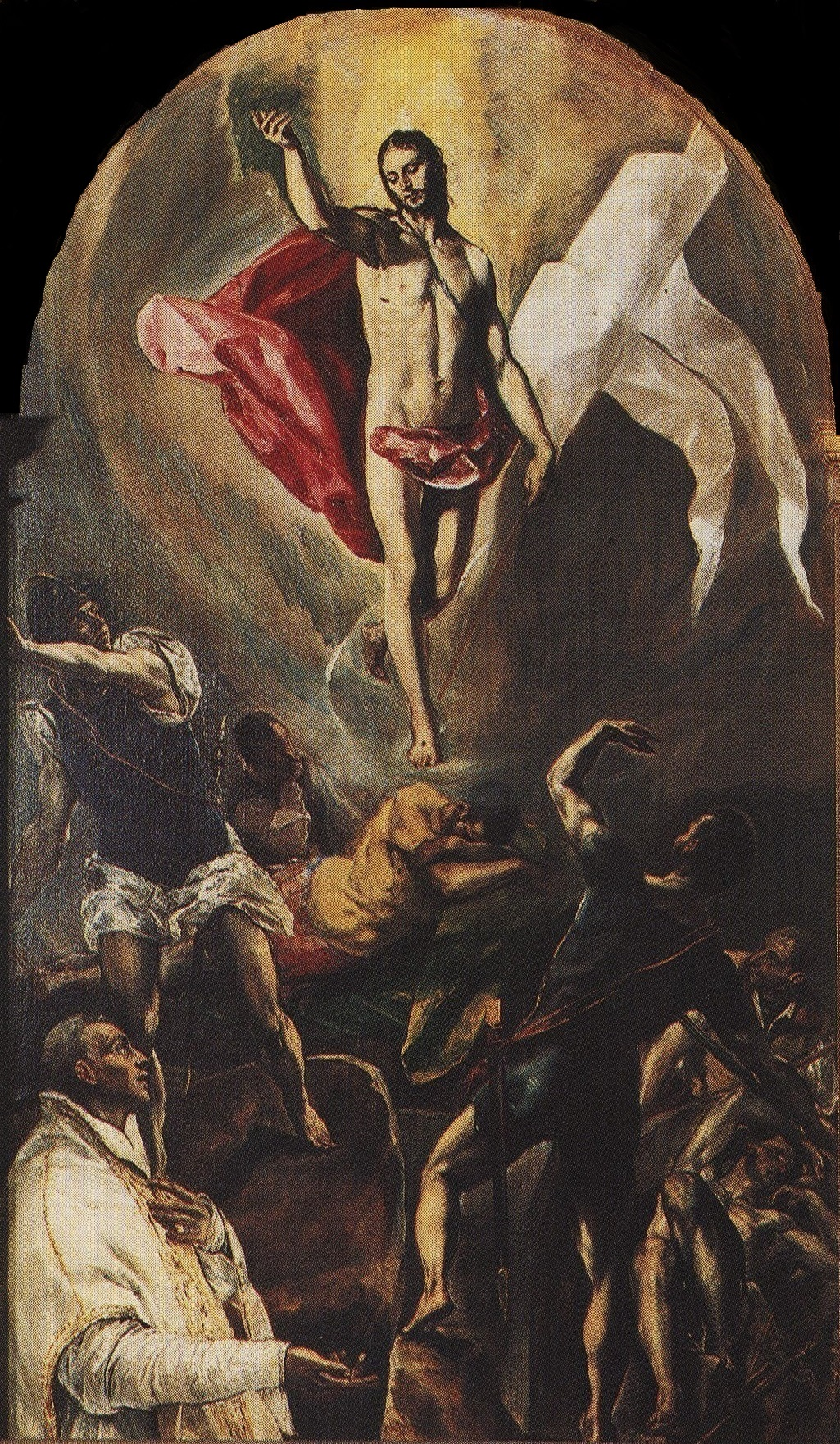 La obra representa la resurrección de Jesucristo.